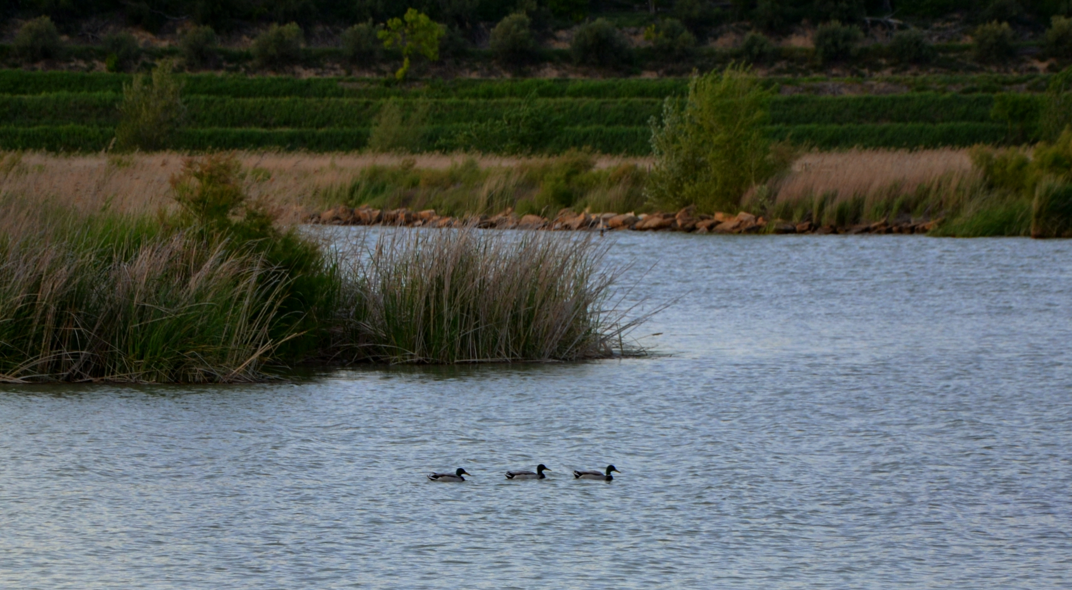 Estany d'Ivars i Vila-sana This is a a photo of a natural area in Catalonia, Spain, with id: ES510252